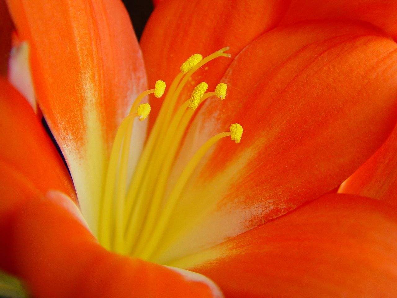 Clivia miniataClivia miniata